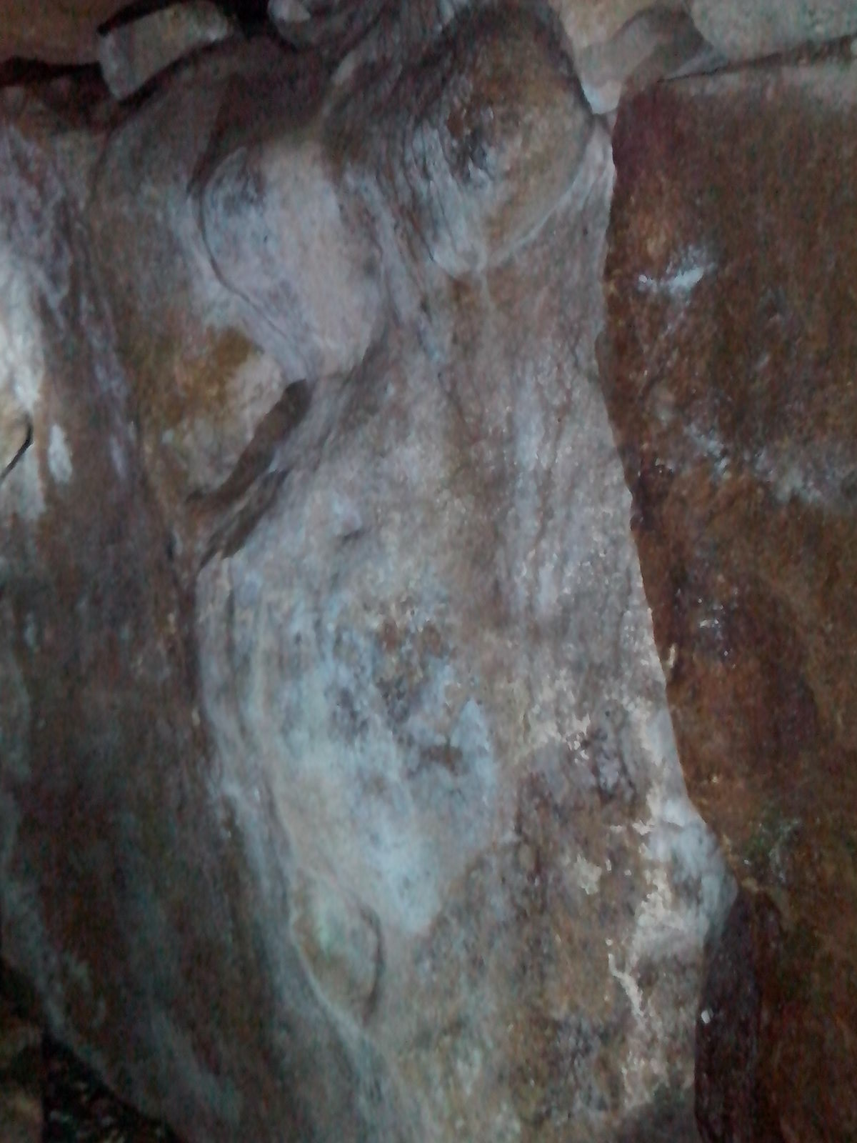 Dolmen du Reclus .